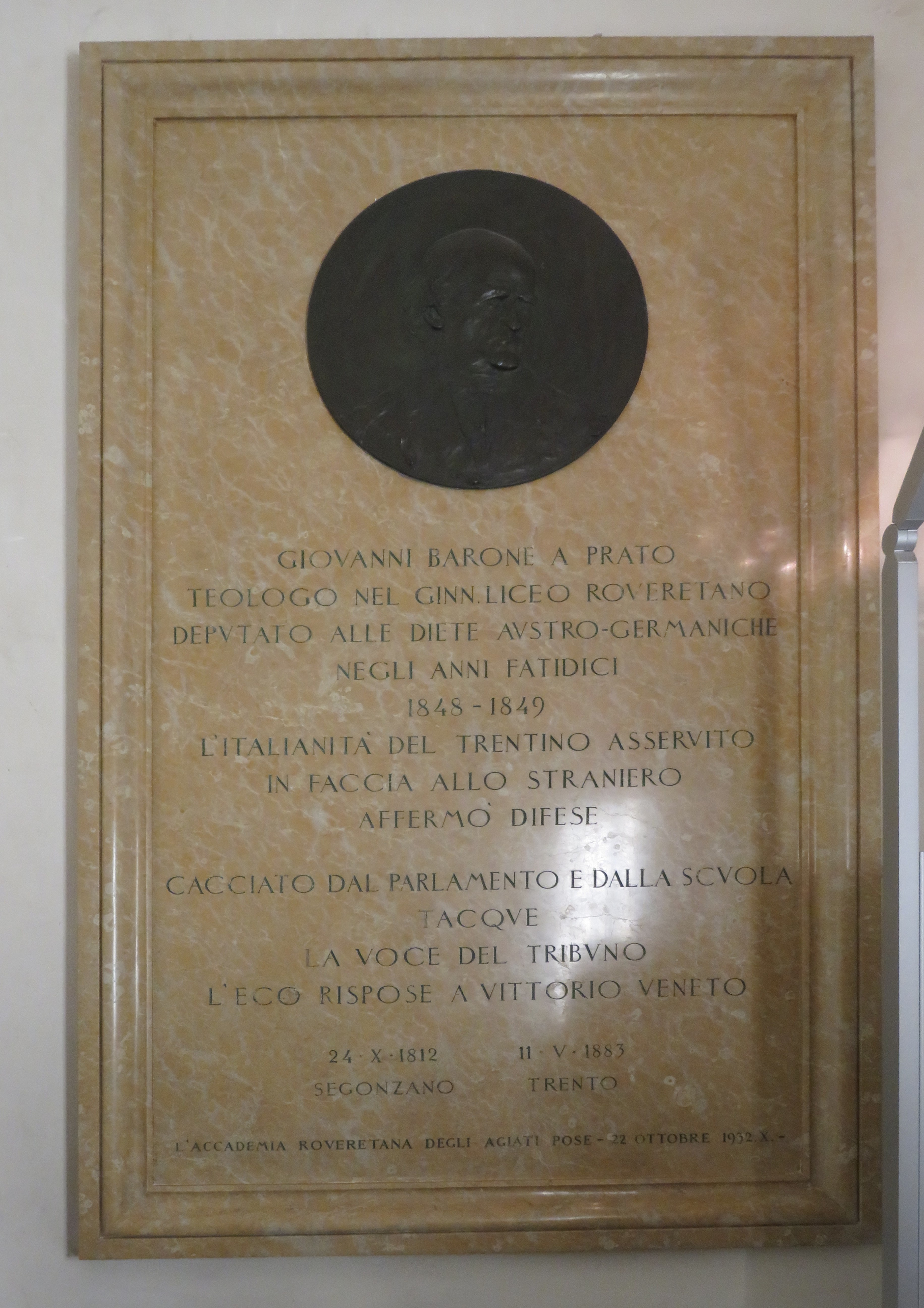 Salone d'ingresso al piano rialzato trasformata, nel corso degli anni, nel Pantheon roveretano. Lapide commemorativa dell'abate barone Giovanni a Prato